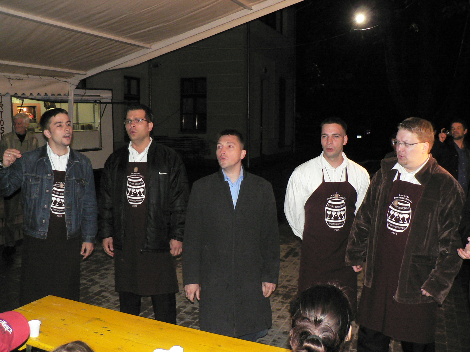 Kovács Ákos és a Vivát, Bacchus!